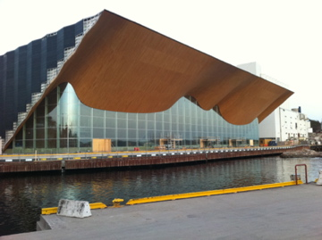 Kilde teater- og konserthus på Odderøya, Kristiansand